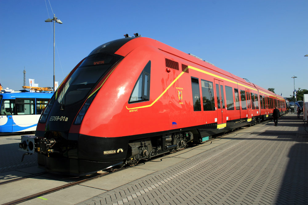 Elektryczny zespół trakcyjny ED59-01 prezentowany podczas targów InnoTrans 2006 w Berlinie.